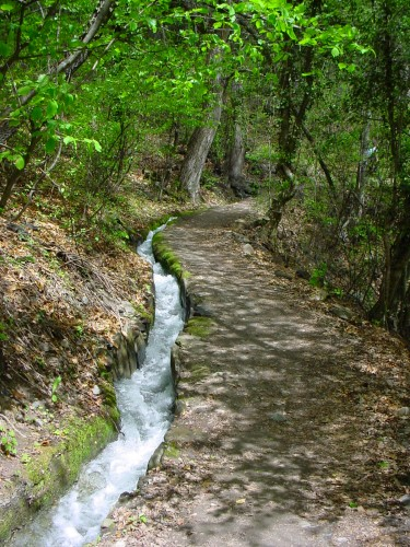 Schnalswaal zwischen Juval und Tschars